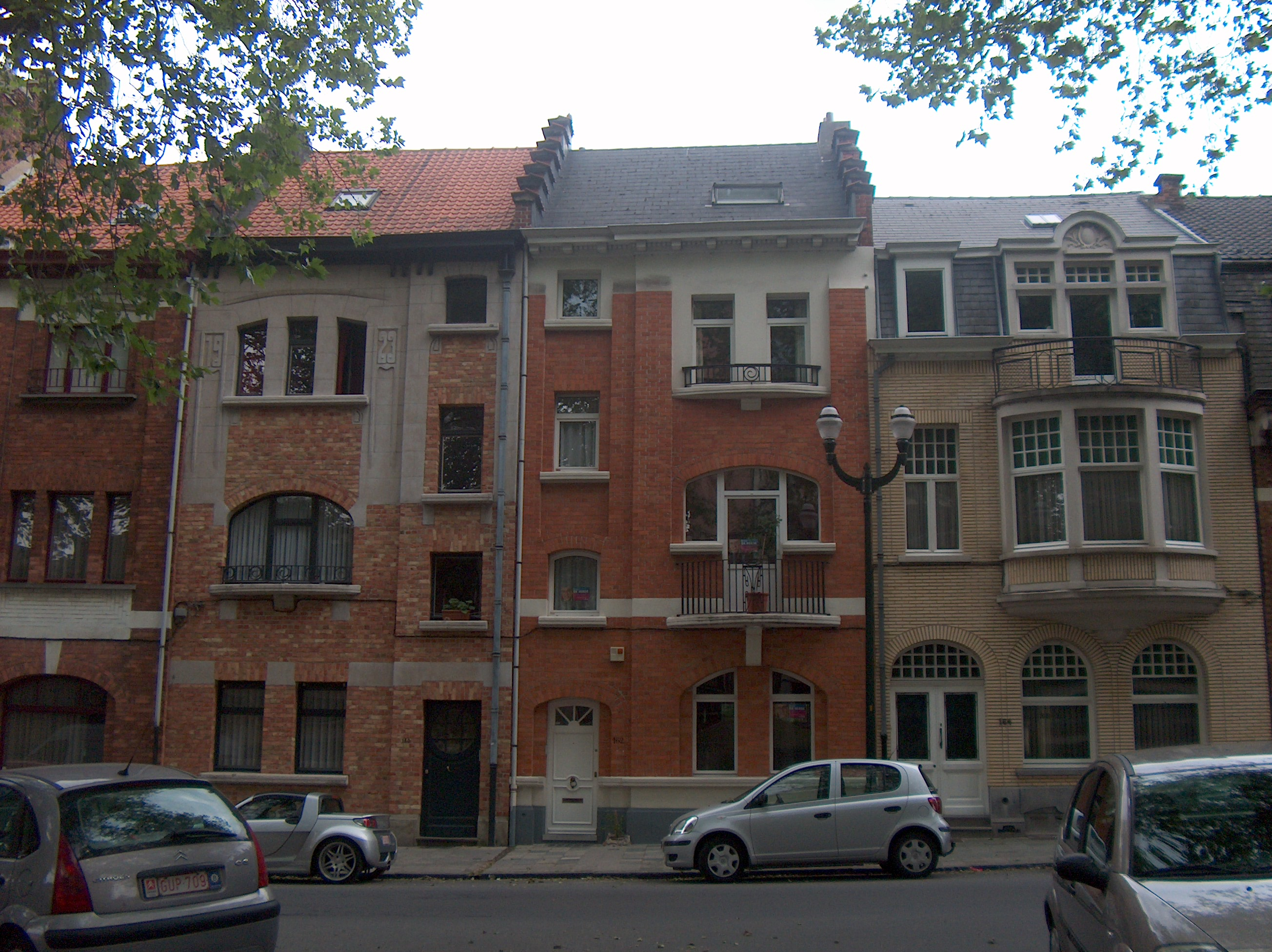 L'avenue Voltaire à Schaerbeek, Bruxelles, Belgique.